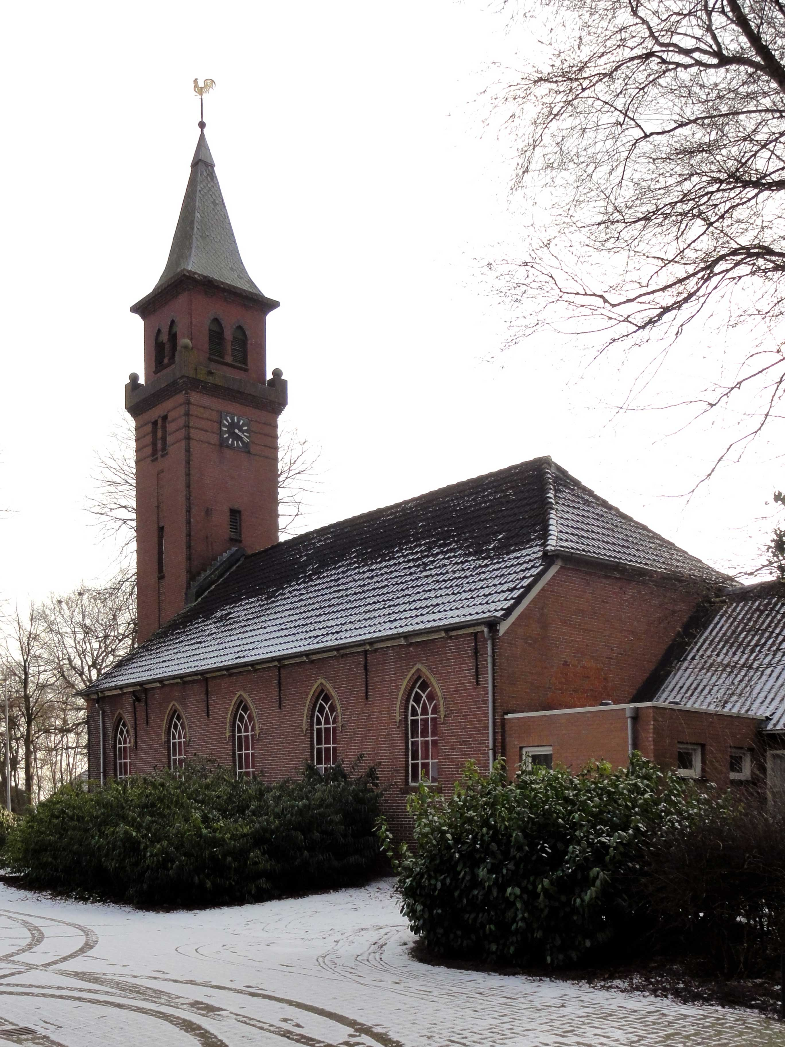 Kerk nummer 11 aan het Zuiderdiep 505 in Valthe, provinciaal monument